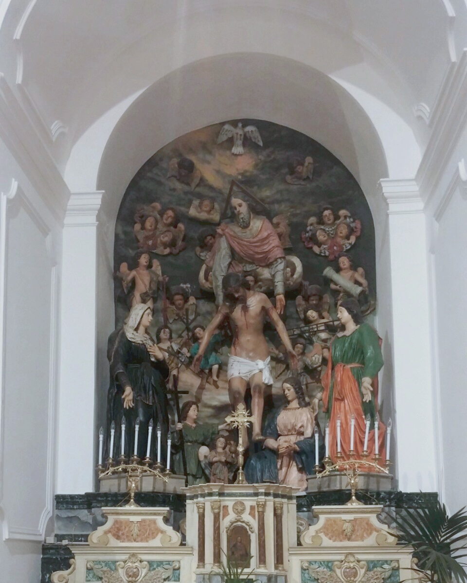 Deposizione e ascensione di Cristo all'interno della chiesa Matrice Santa Maria delle Nevi di Girifalco (CZ)